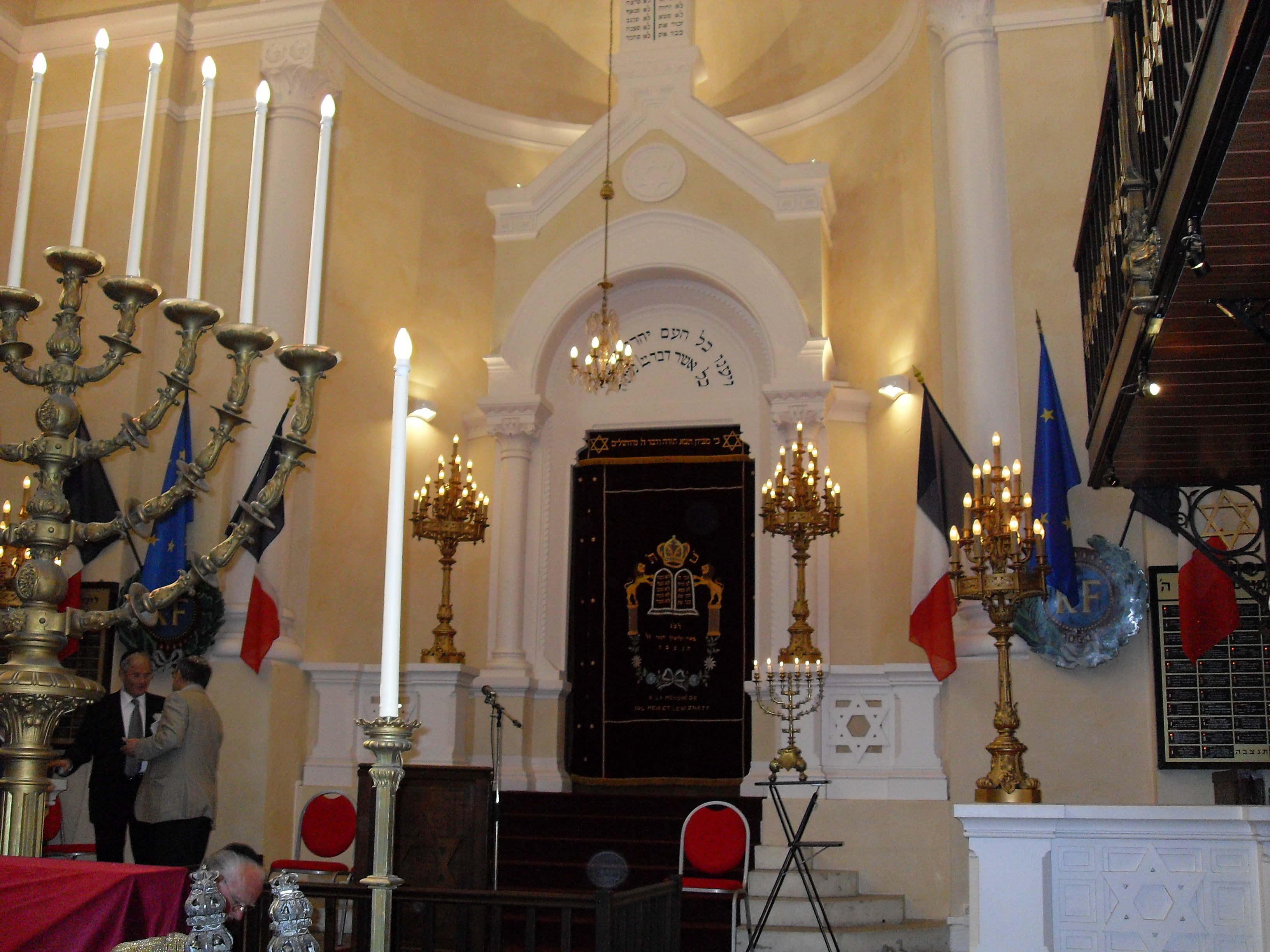 France, Versailles, Yvelines (78) - Choeur de la synagogue pavoisée à l'occasion de la Journée nationale du souvenir des victimes et des héros de la déportation, le 25 avril 2010 - Au-dessus de l'Arche Sainte est inscrit en hébreu le verset biblique Exode 19:8 : et le peuple entier, d'un commun accord, répondit : "Tout ce qu'a dit l'Eternel, nous le ferons!"